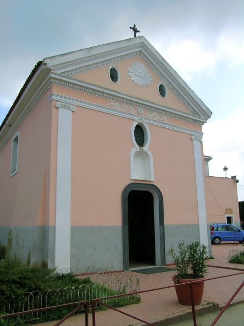 Più volte ristrutturato, il santuario risale a prima del X sec. ed ha origine benedettina volturnense. Wikipedia: Villa di Briano; Briano.